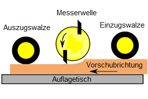 Schema Arbeitsweise Dicktenhobelmaschine